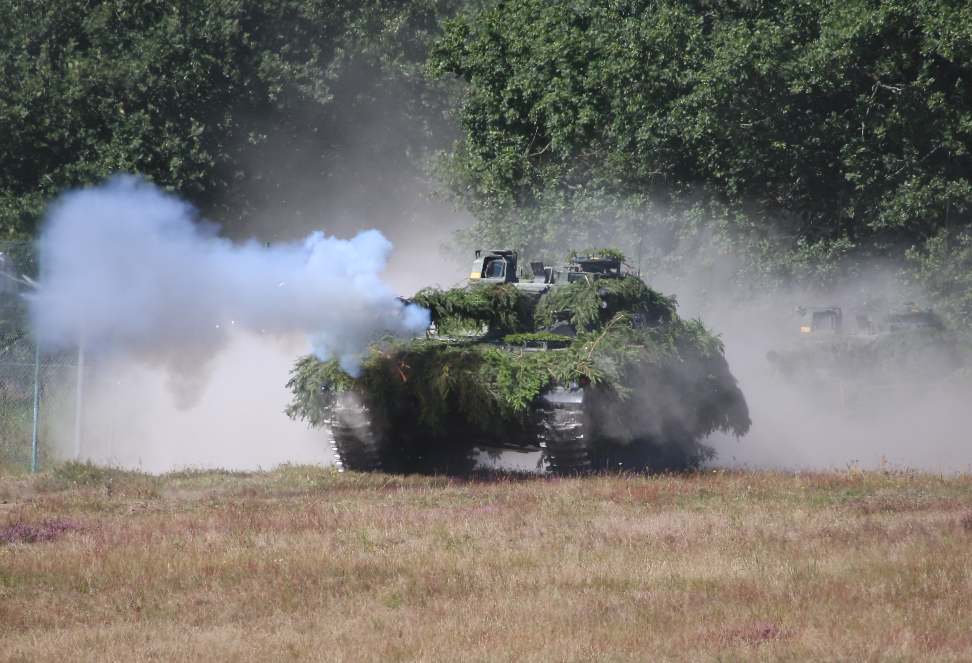 Stridsfordon 9040 Revinge 2016